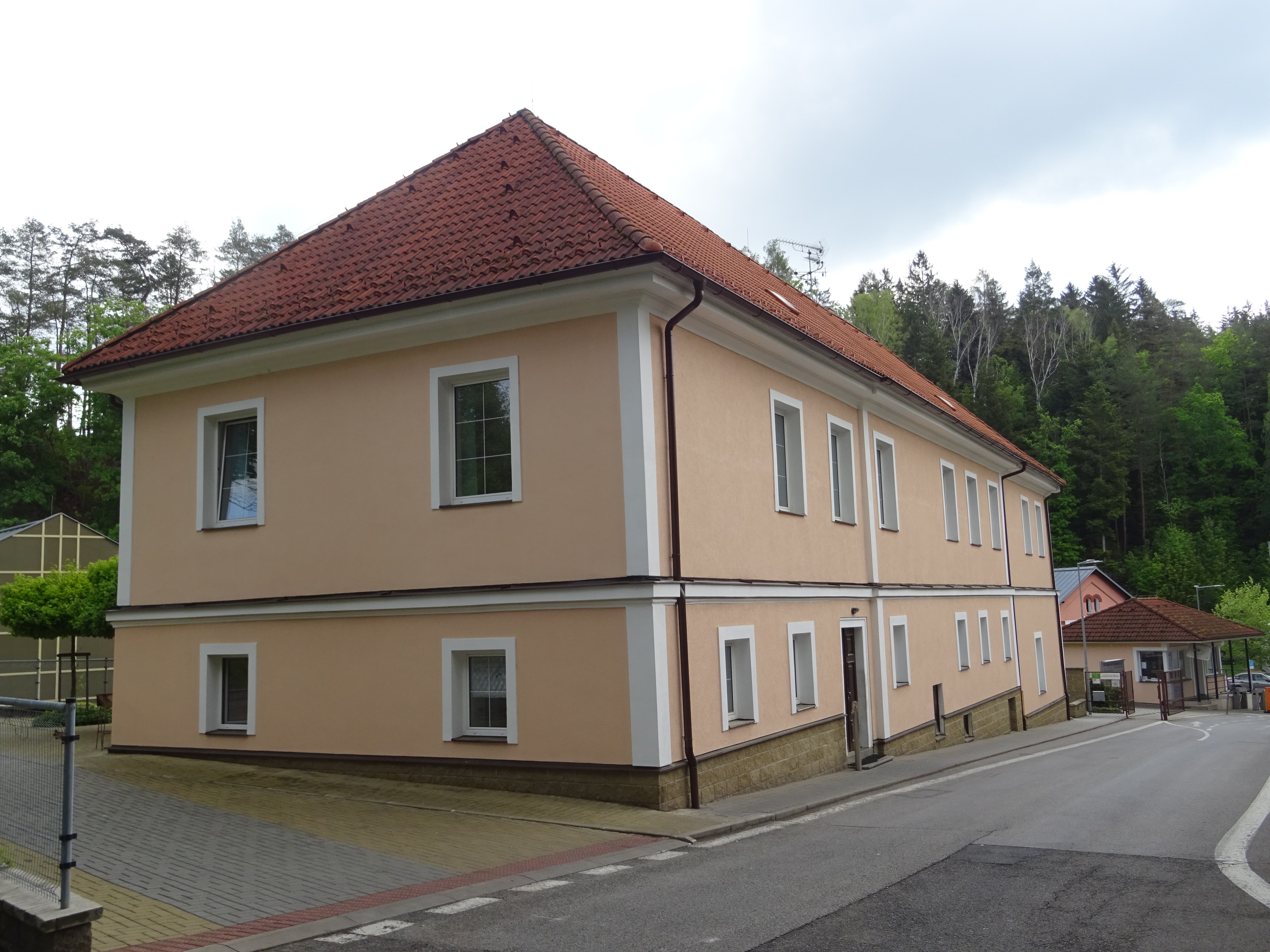 Bývalý mlýn v Kamenici čp. 10, později přestavěný na hamr ke zpracování rudy. Dnes je budova zrekonstruována a je součástí průmyslového areálu Strojmetal Kamenice.